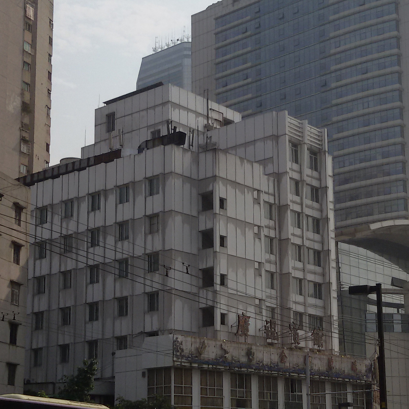 粵語: 廣東廣視賓館